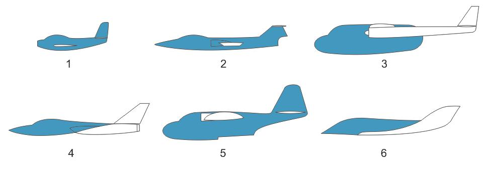 distintos tipos de fuselajes de avión